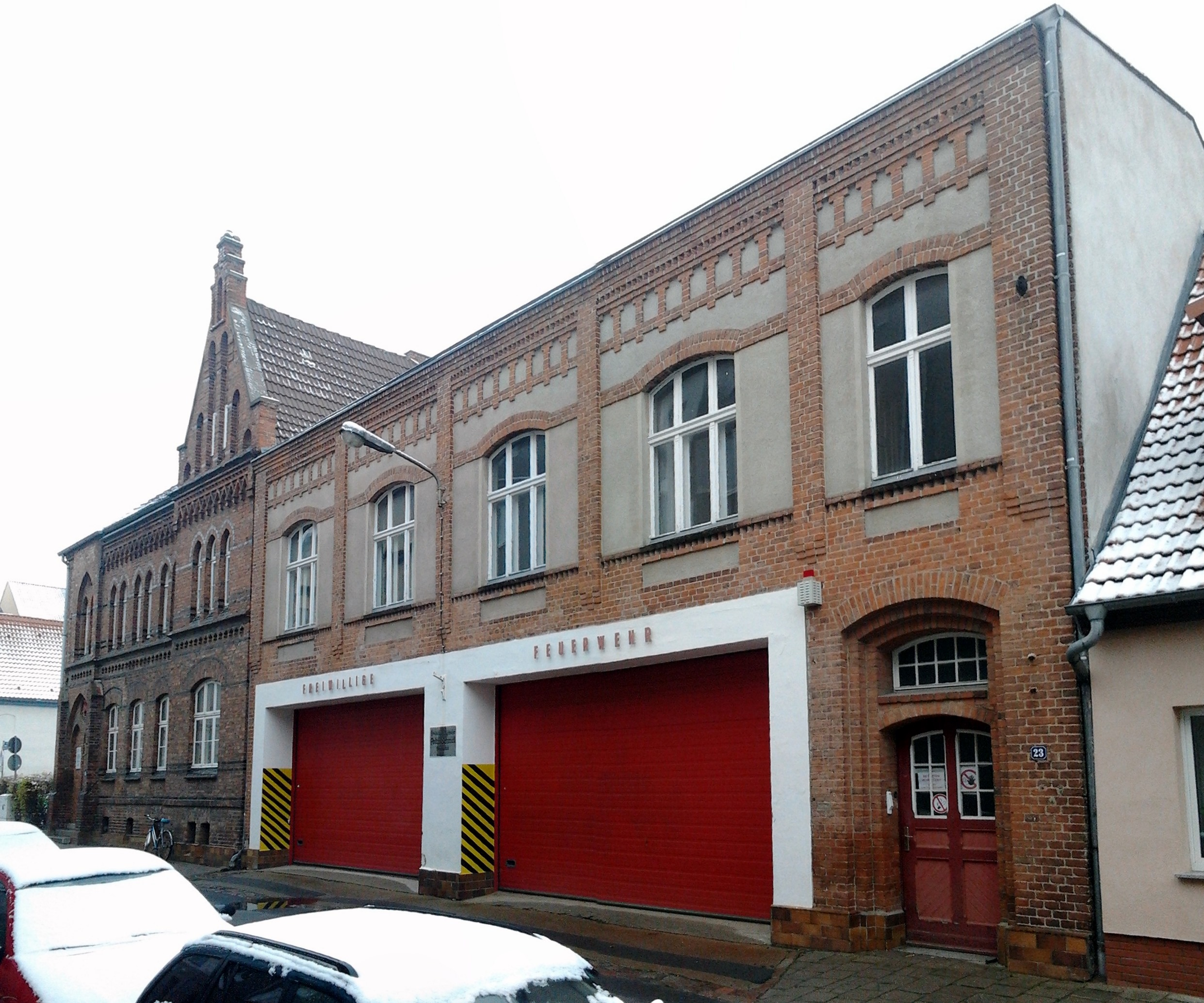 Greifswald, Baderstraße 23/24, Alte Feuerwehr